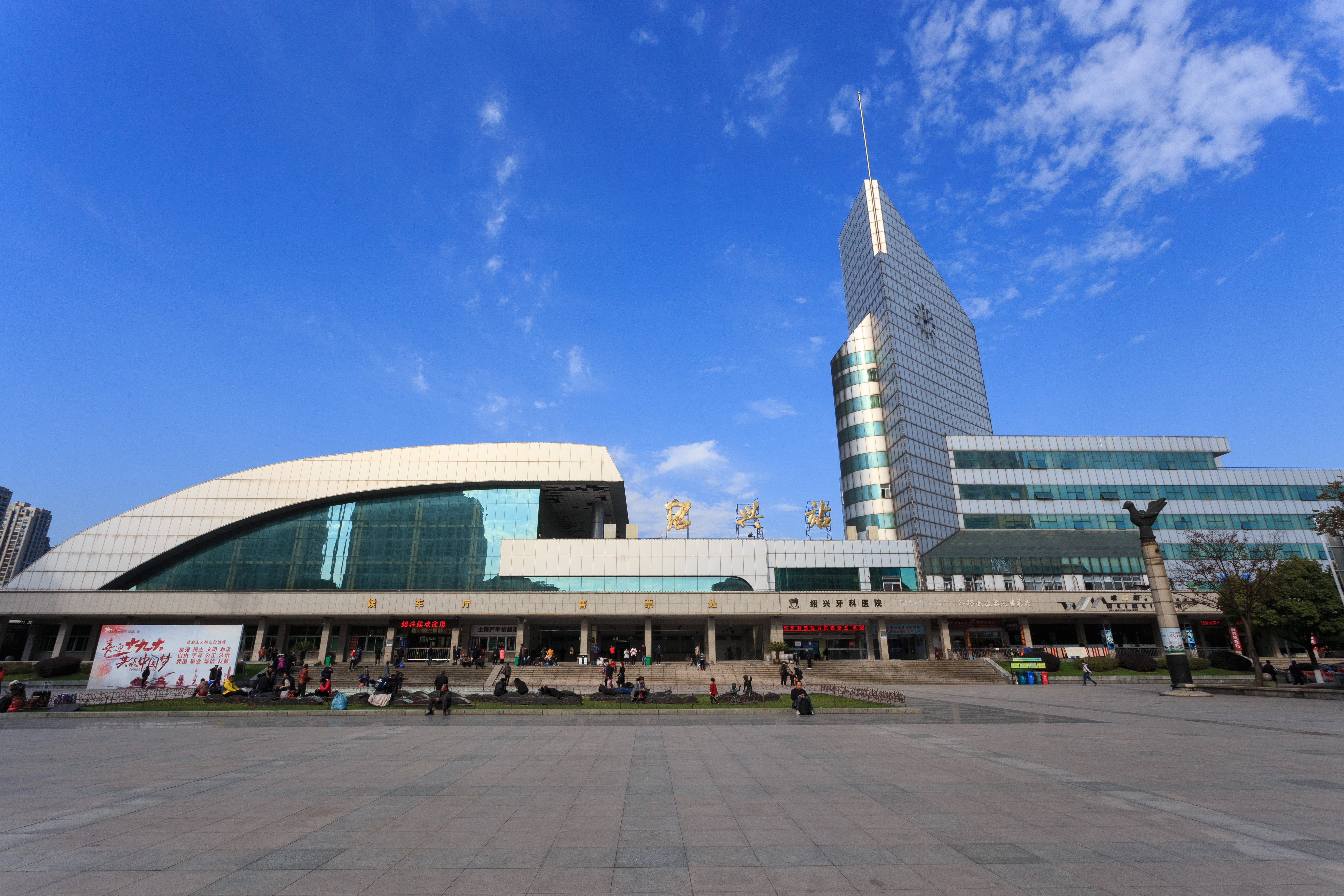 绍兴站